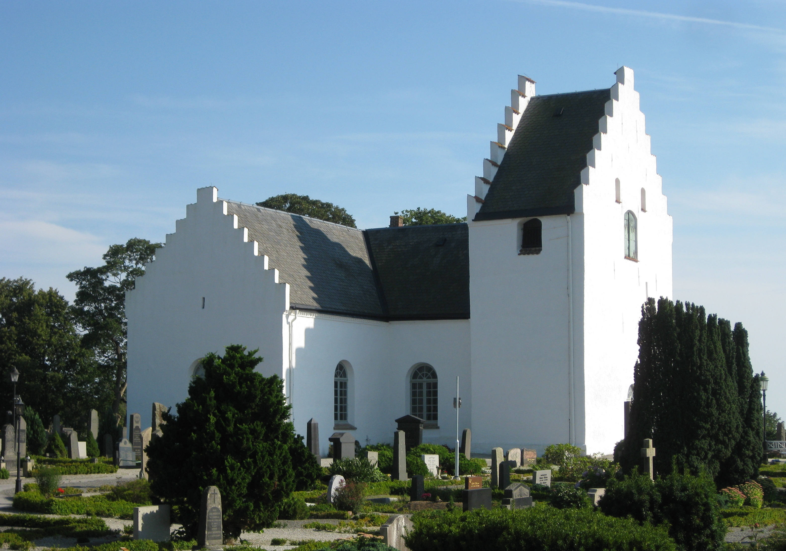 Sankt Laurentii kyrka i Skivarp, Skåne